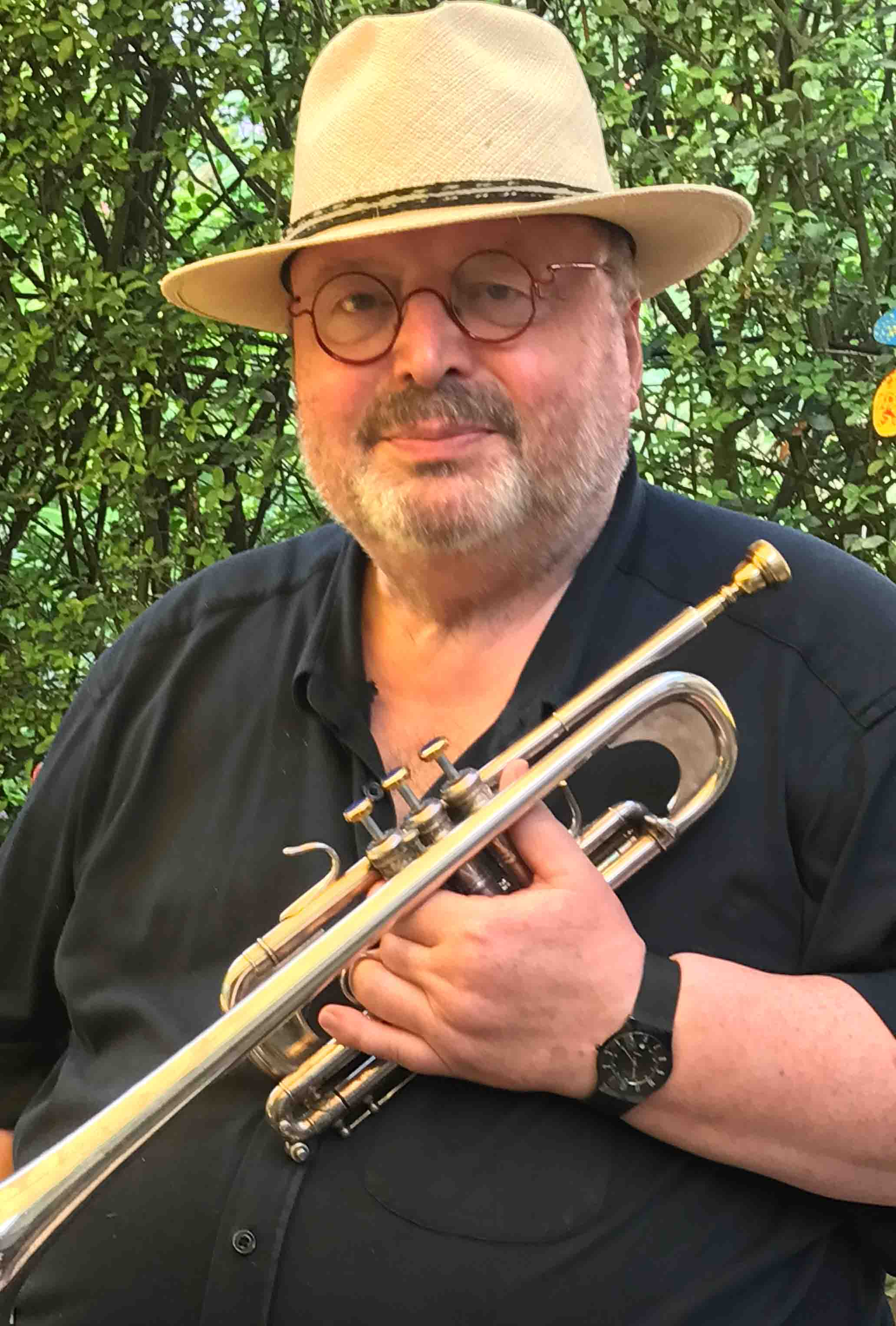 Co Wolfgang G. Haas-Musikverlag Köln e. K. 2019